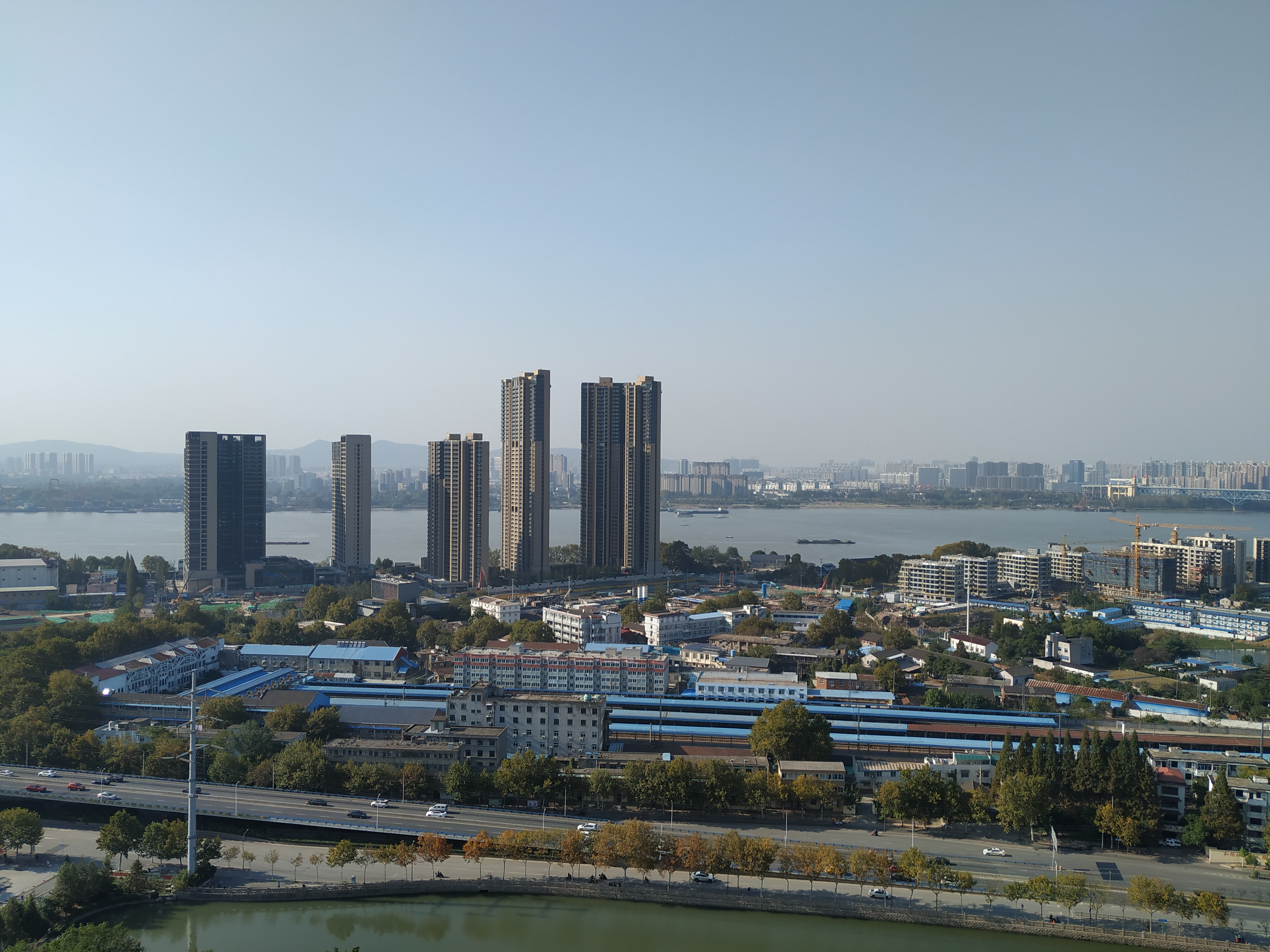 中文（中国大陆）: 阅江楼顶层欣赏南京城市风光